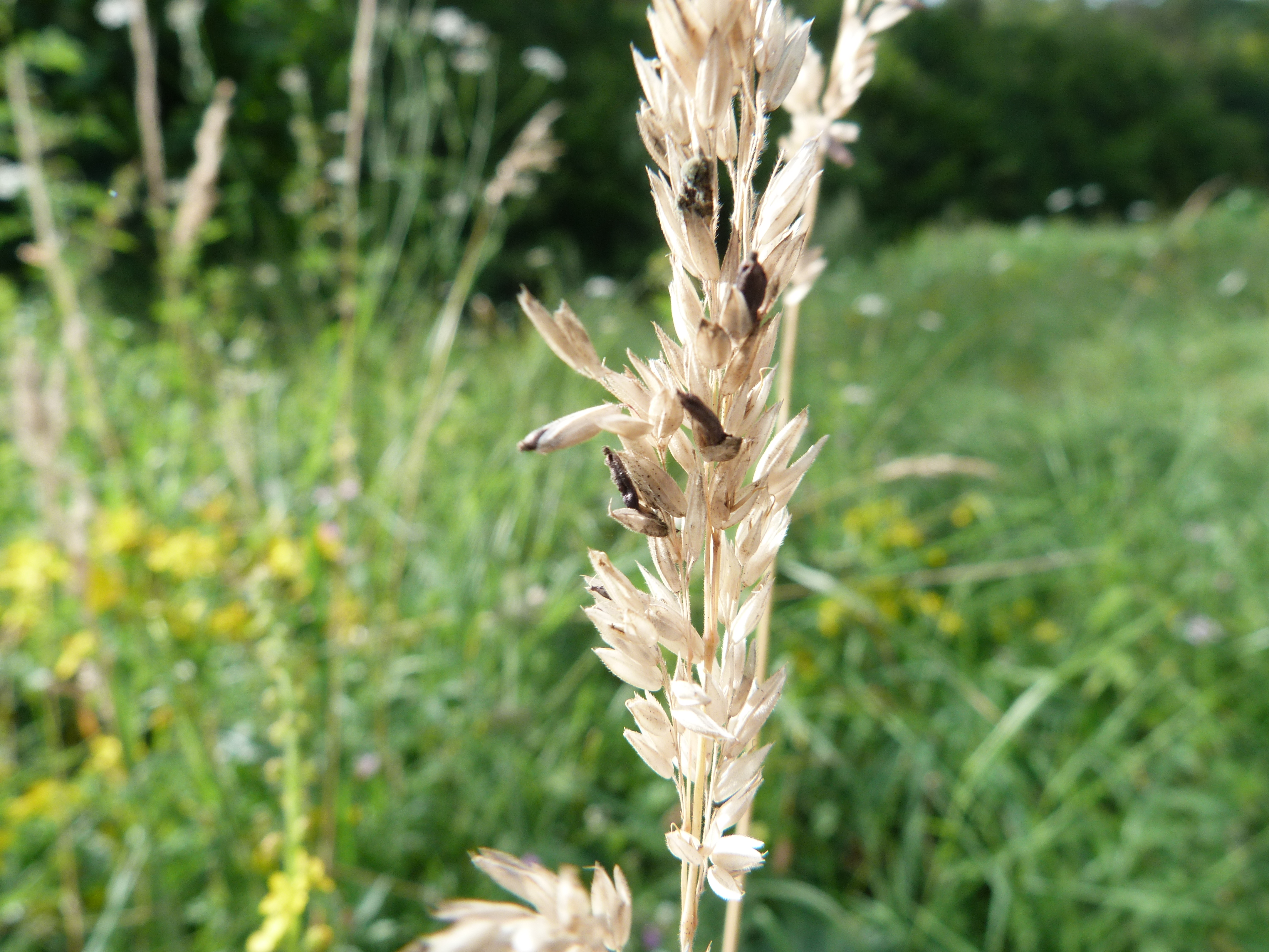 Holcus lanatus kun Claviceps purpurea